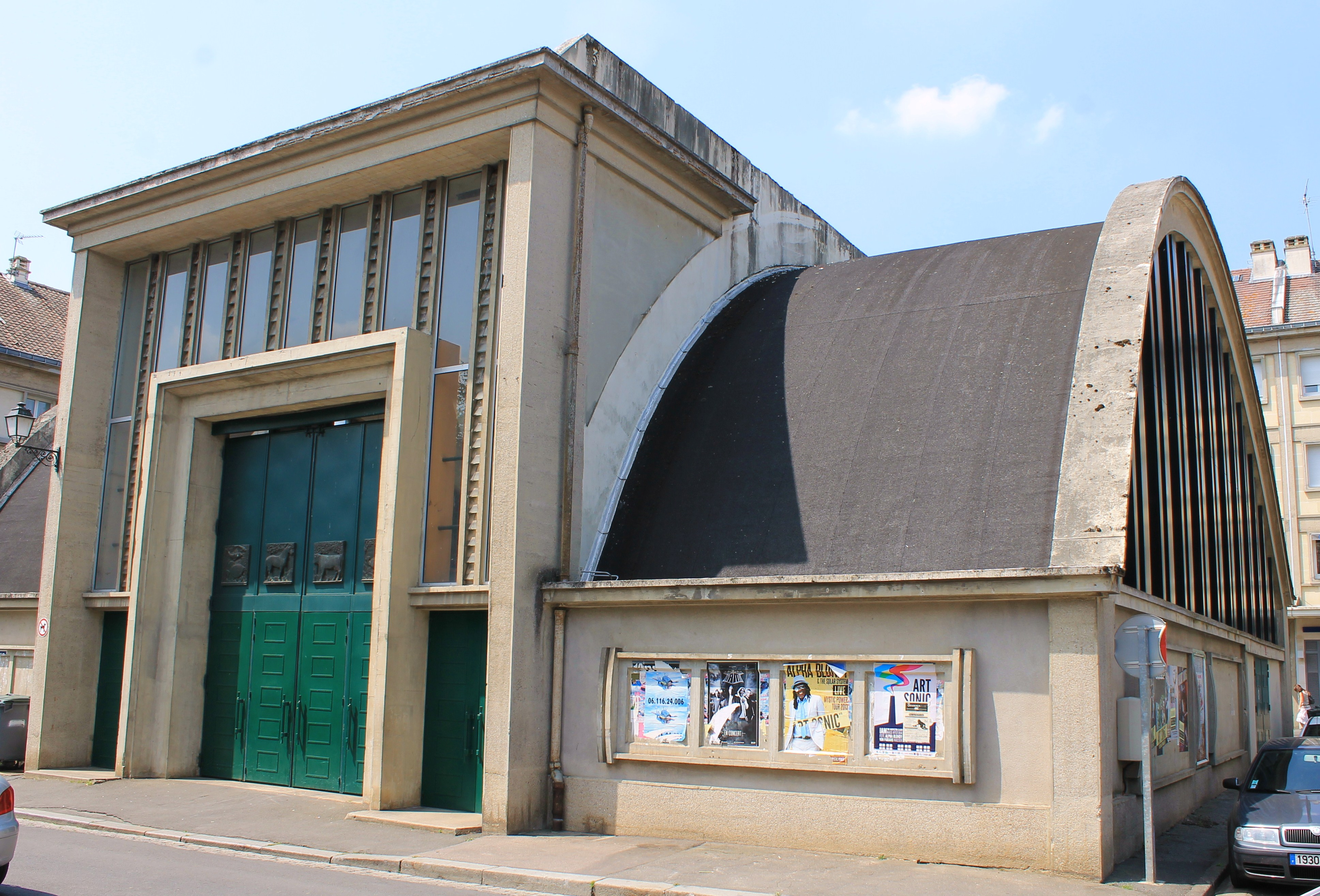 Marché couvert au 22 bis rue de l'Amiral-Courbet à Falaise (Calvados)